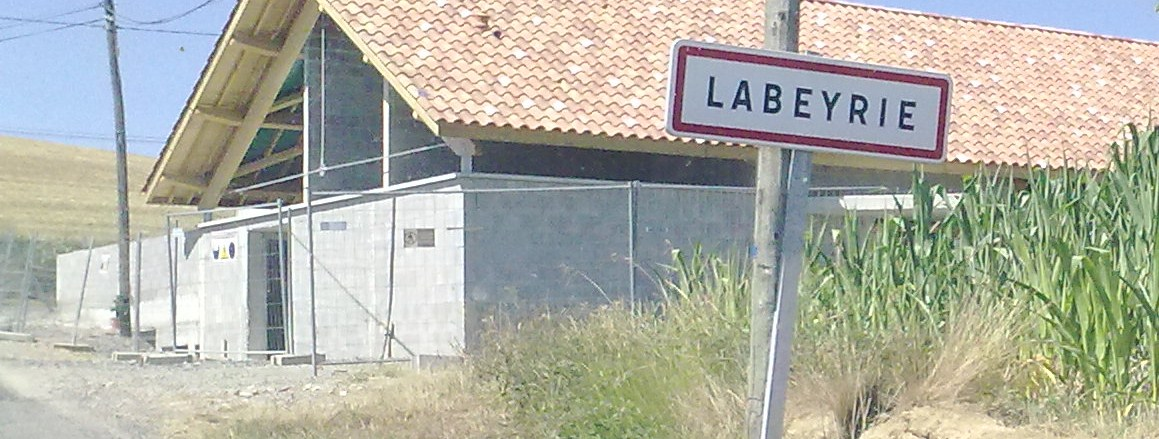 Labeyrie (Pyrénées-Atlantiques) le 18 juillet 2010, France.